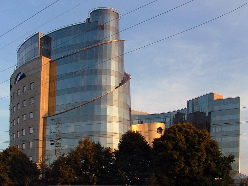 Budynek TVP w Warszawie, ul. Jana Pawła Woronicza 17